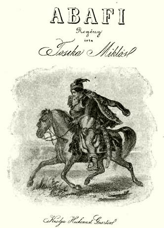 Az Abafi című regény.